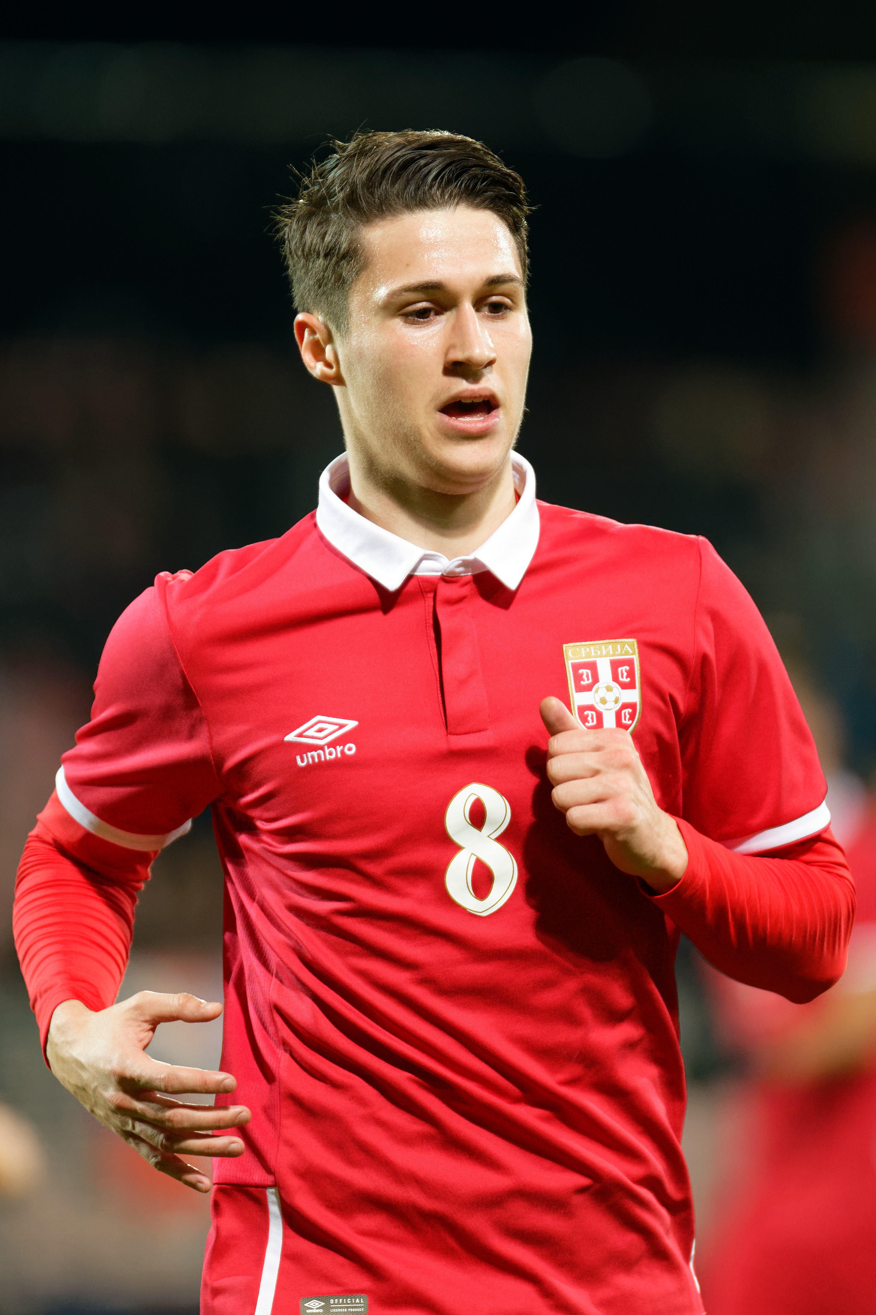 U21 Europameisterschaftsqualifikationsspiel Österreich gegen Serbien am 11.10.2017 in der BSFZ-Arena Maria Enzersdorf. Bild zeigt: Danilo Pantić